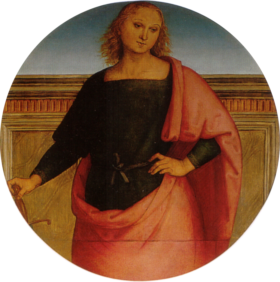 Perugino, pala di sant'agostino, santo giovane con spada.jpg